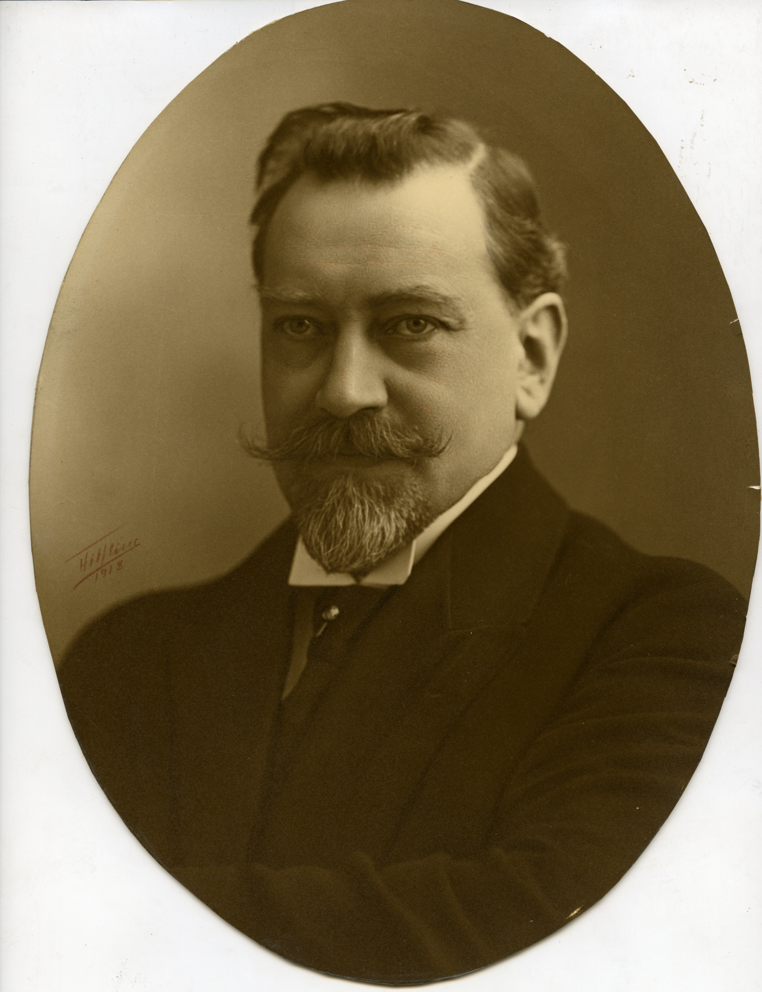 Ole Erichsen (1863–1949), konditor, fabrikkeier og stortingsmann (H) fra Trondhjem.